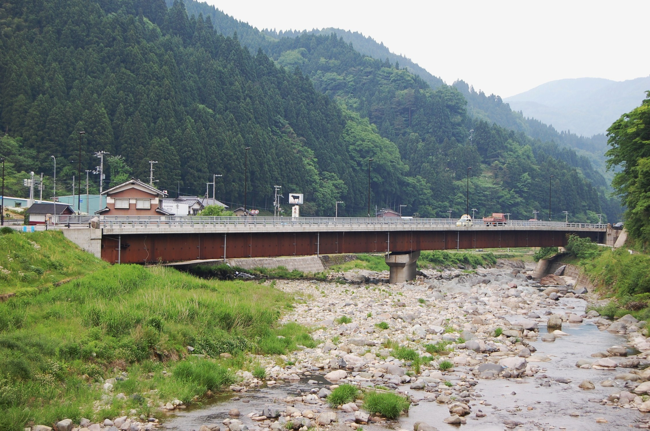 長板友木橋。国道482号線。香美町村岡区長板。